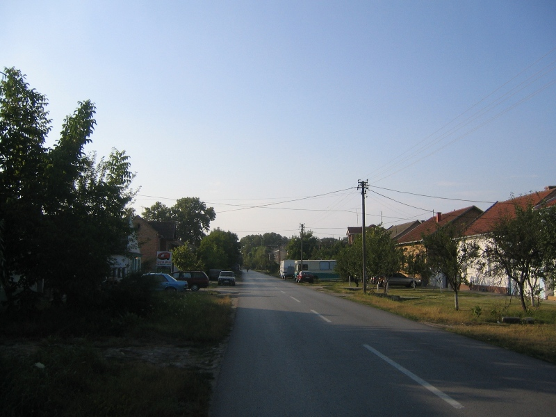 Strada in Alibunar, Banataul Sarbesc